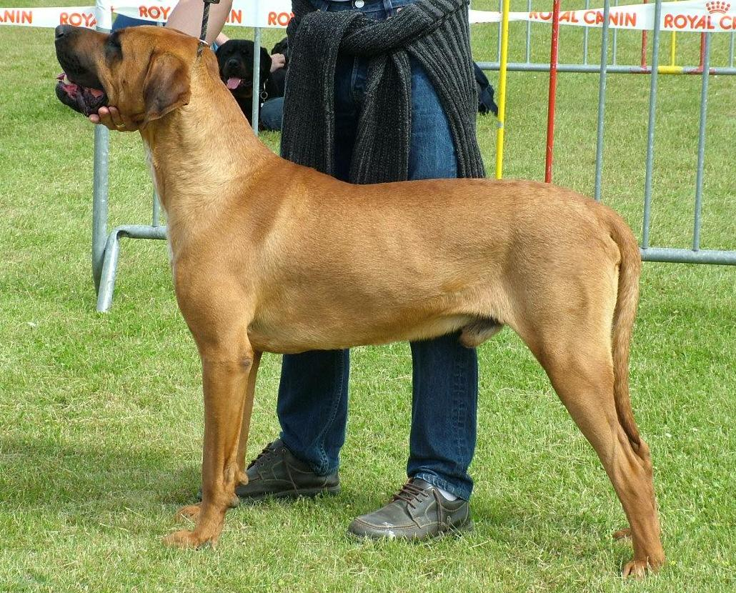 TOSA INU